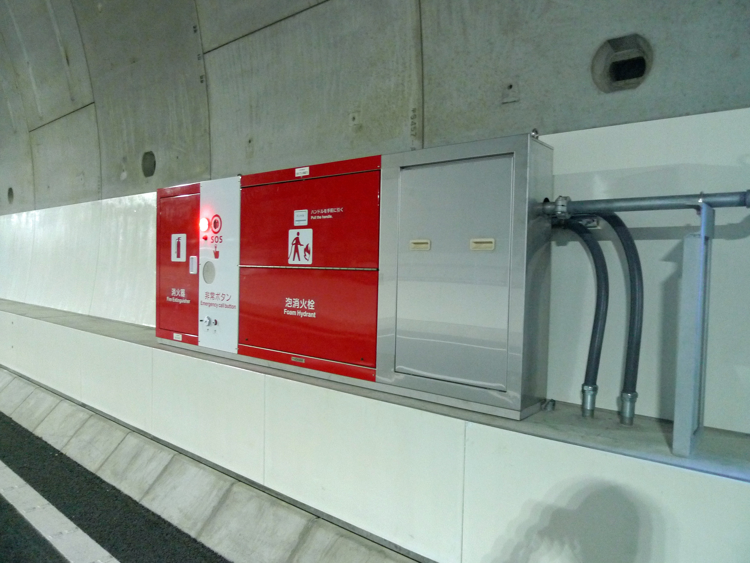 首都高速中央環状線（山手トンネル）五反田出入口付近にある消火設備 開通前見学ツアーで撮影